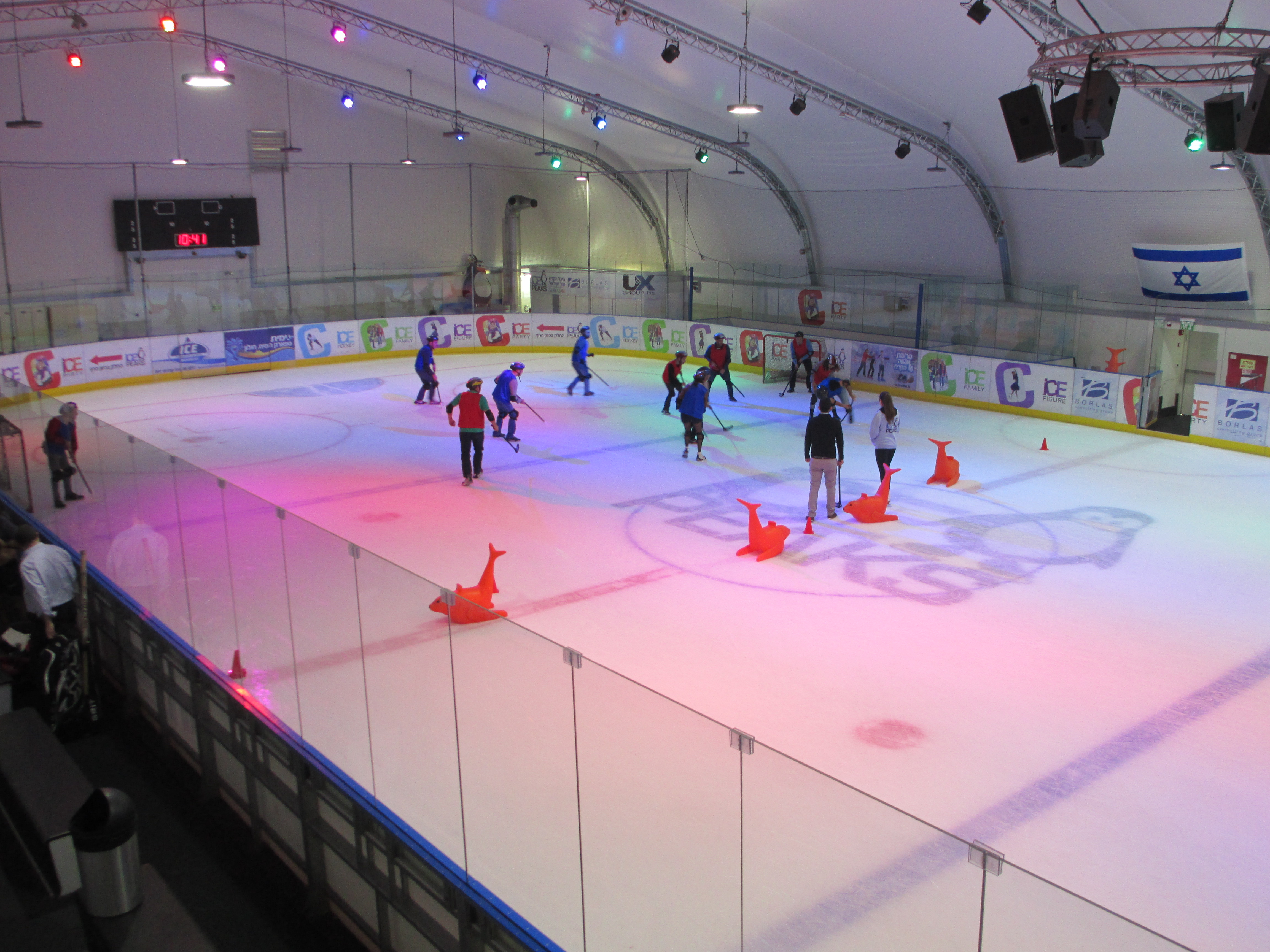 משחק הוקי קרח בהיכל הקרח בפארק פרס